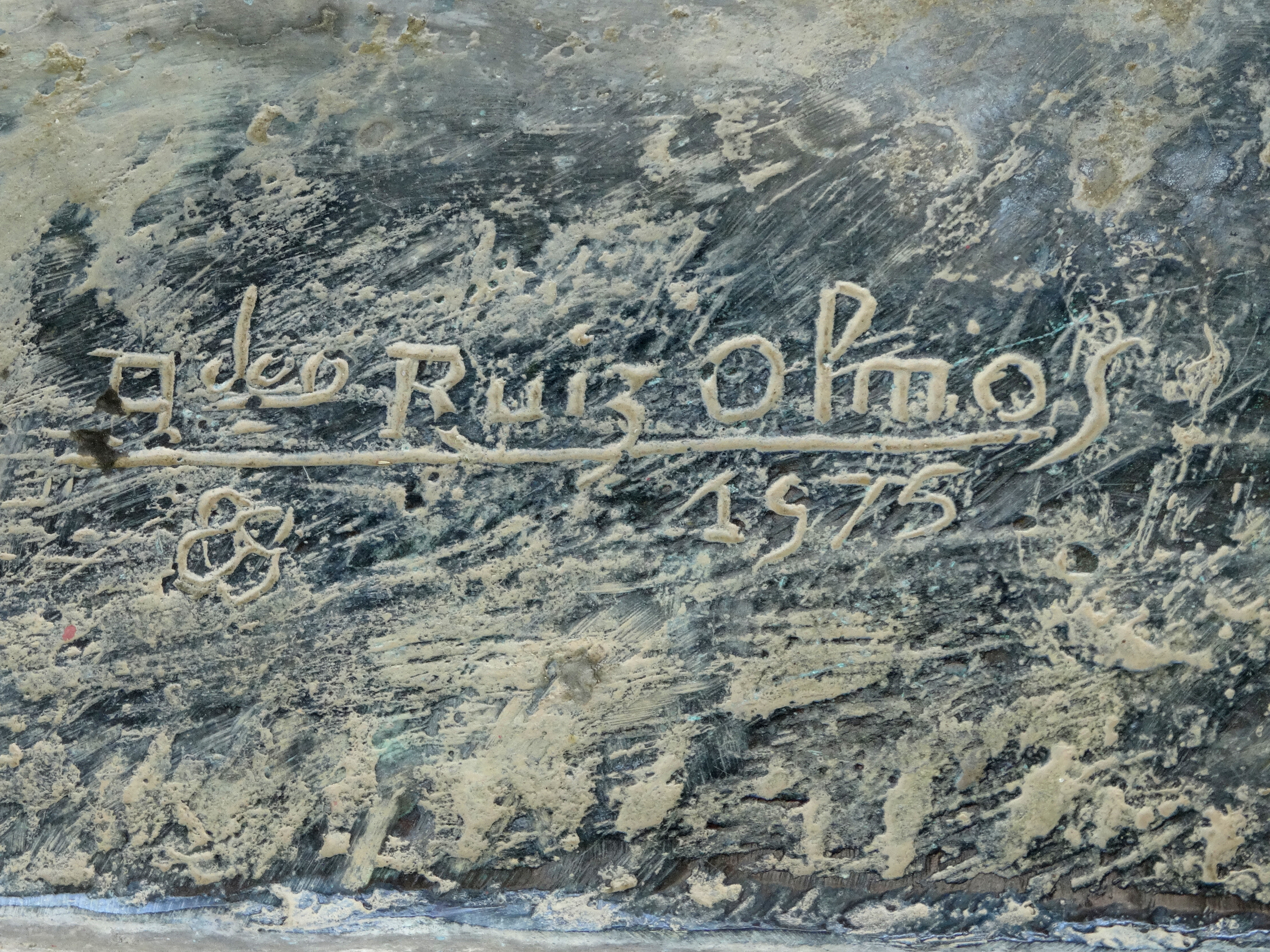 Monumento a los Caídos, Córdoba (España).